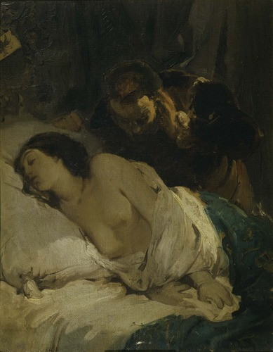 Parisina